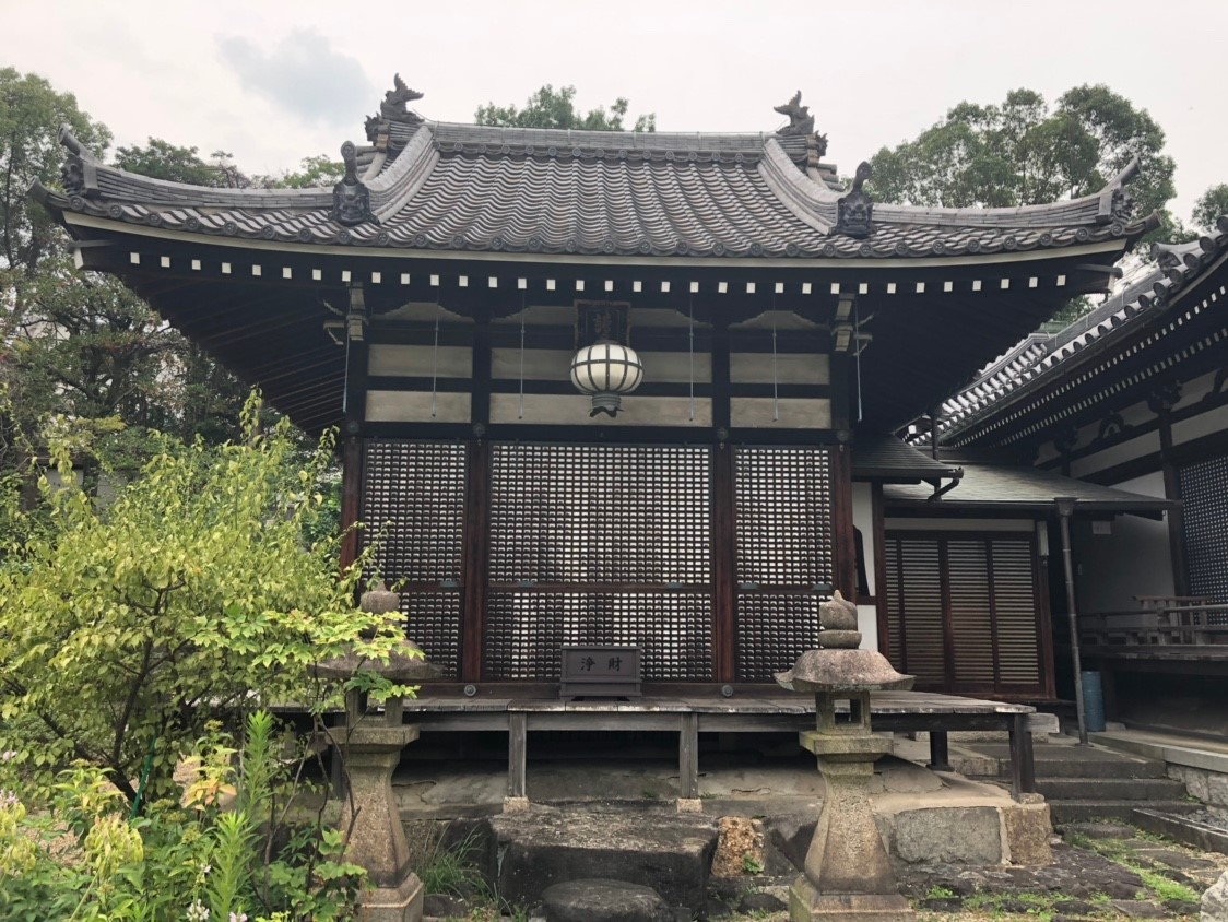 2019年8月、千手寺で撮影。